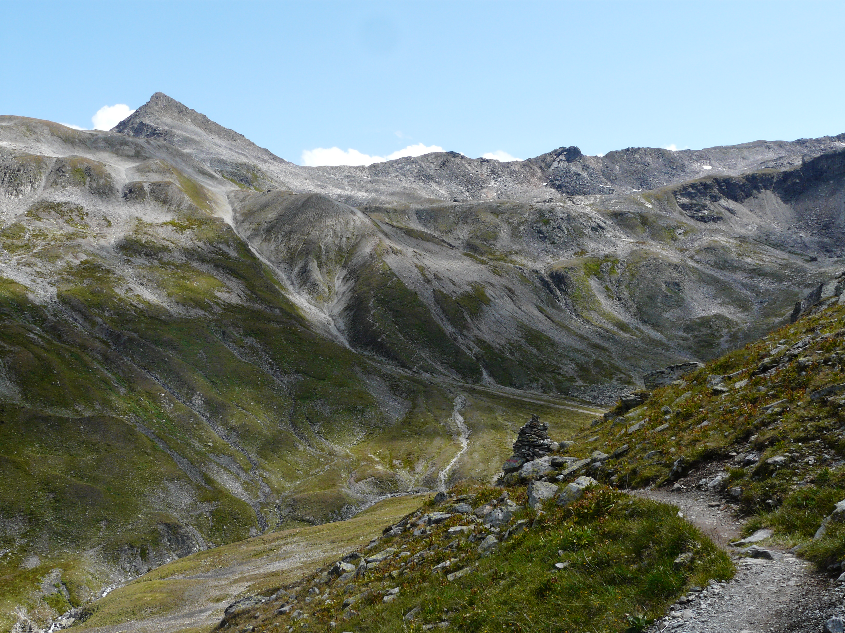 Blick vom Friedrichshafener Weg zum Muttenjoch (links)